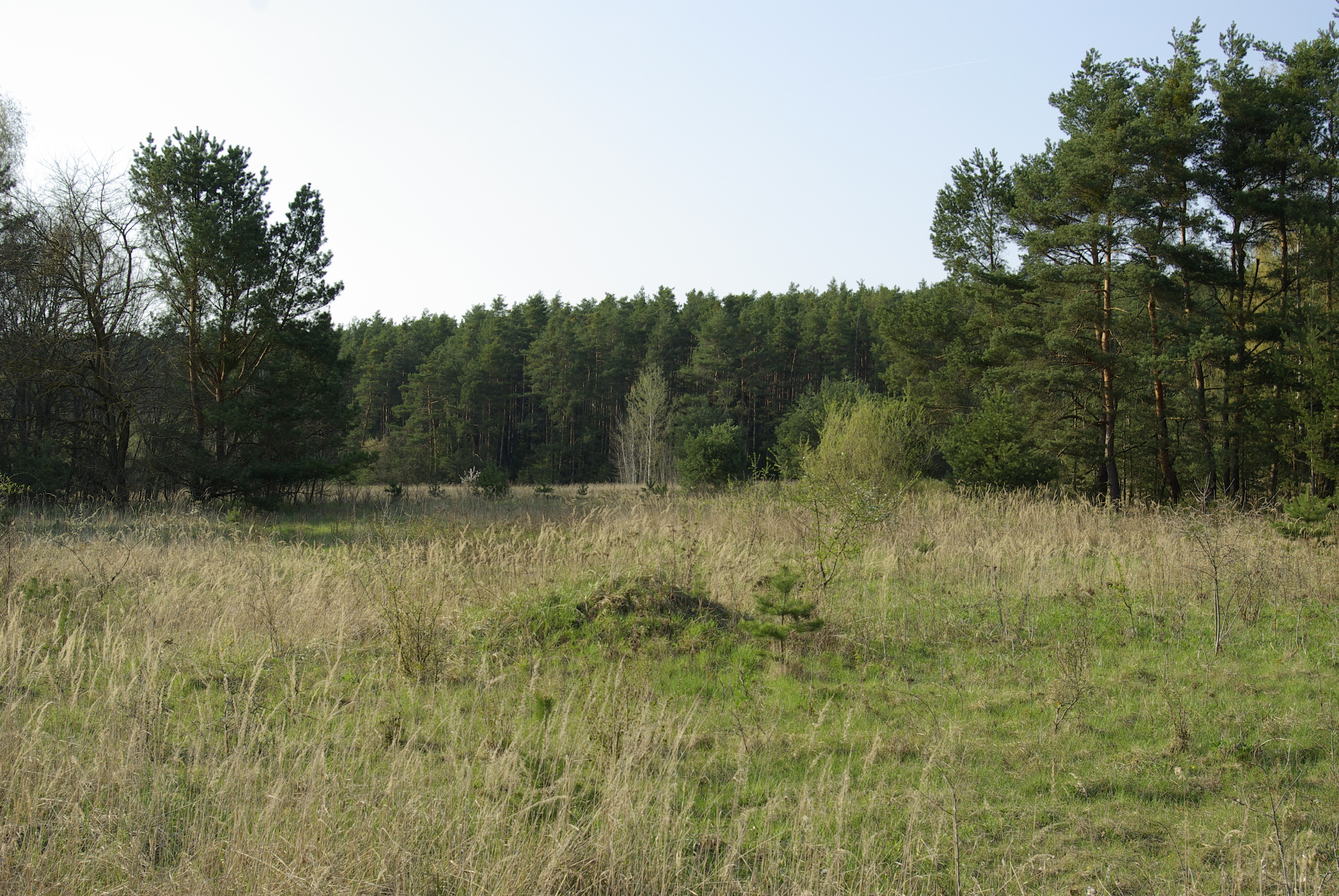 Naturschutzgebiet Tennenloher Forst im Landkreis Erlangen-Höchstadt.